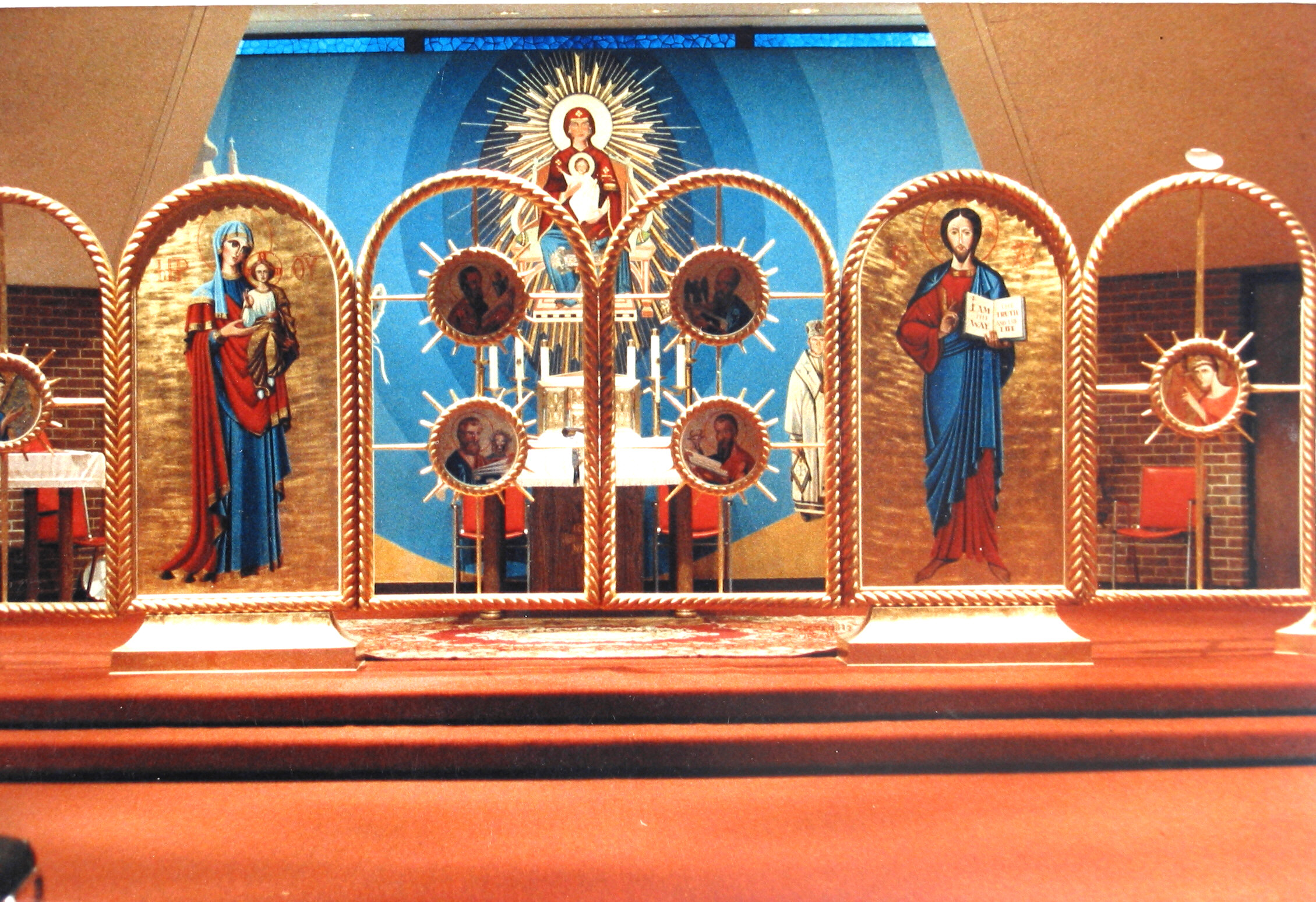 Vígh István: Ikonosztázion a Matawani görög katolikus monostor kápolnájában